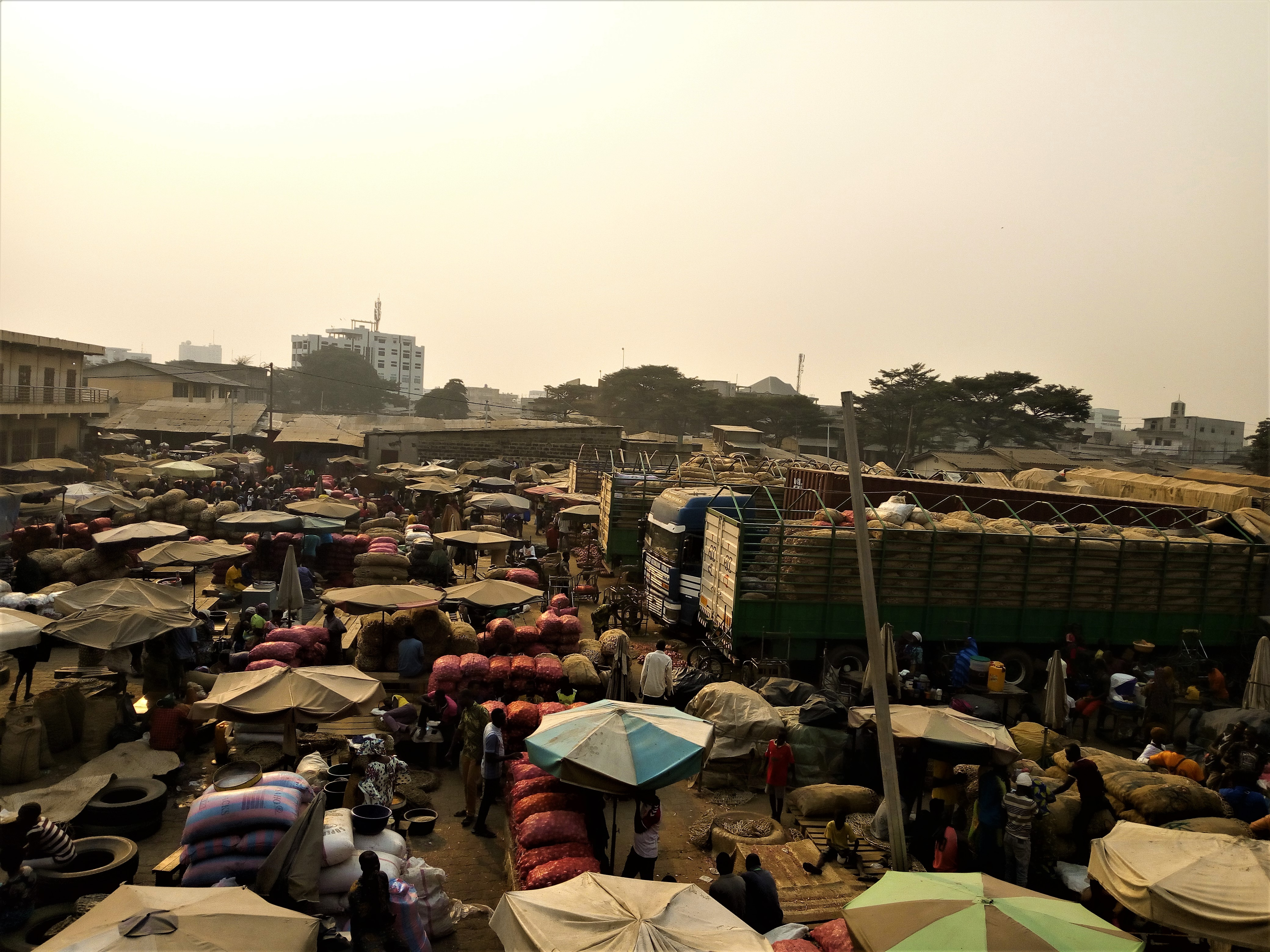 Vue panoramique marché Dantokpa au Bénin